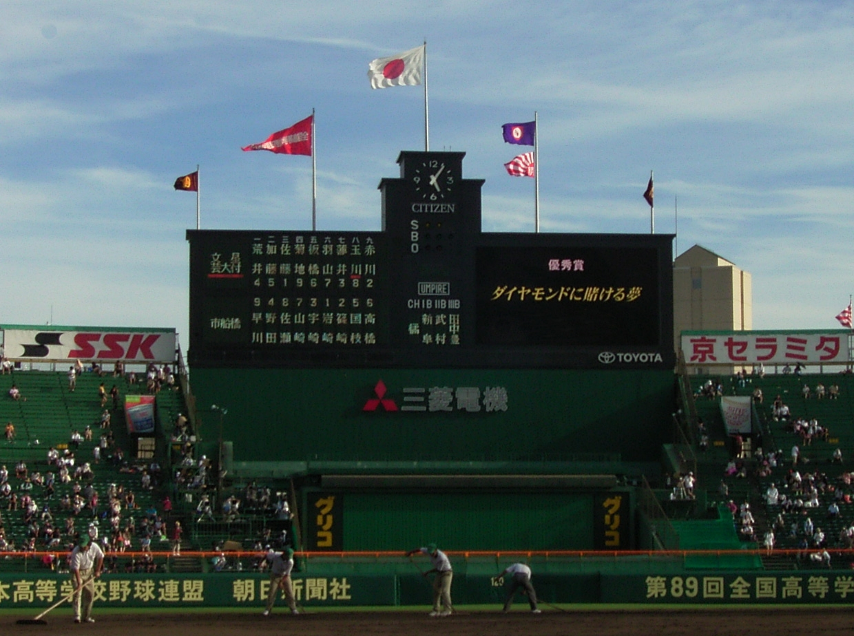 Hanshin Koshien Stadium 優秀賞 ダイヤモンドに賭ける夢